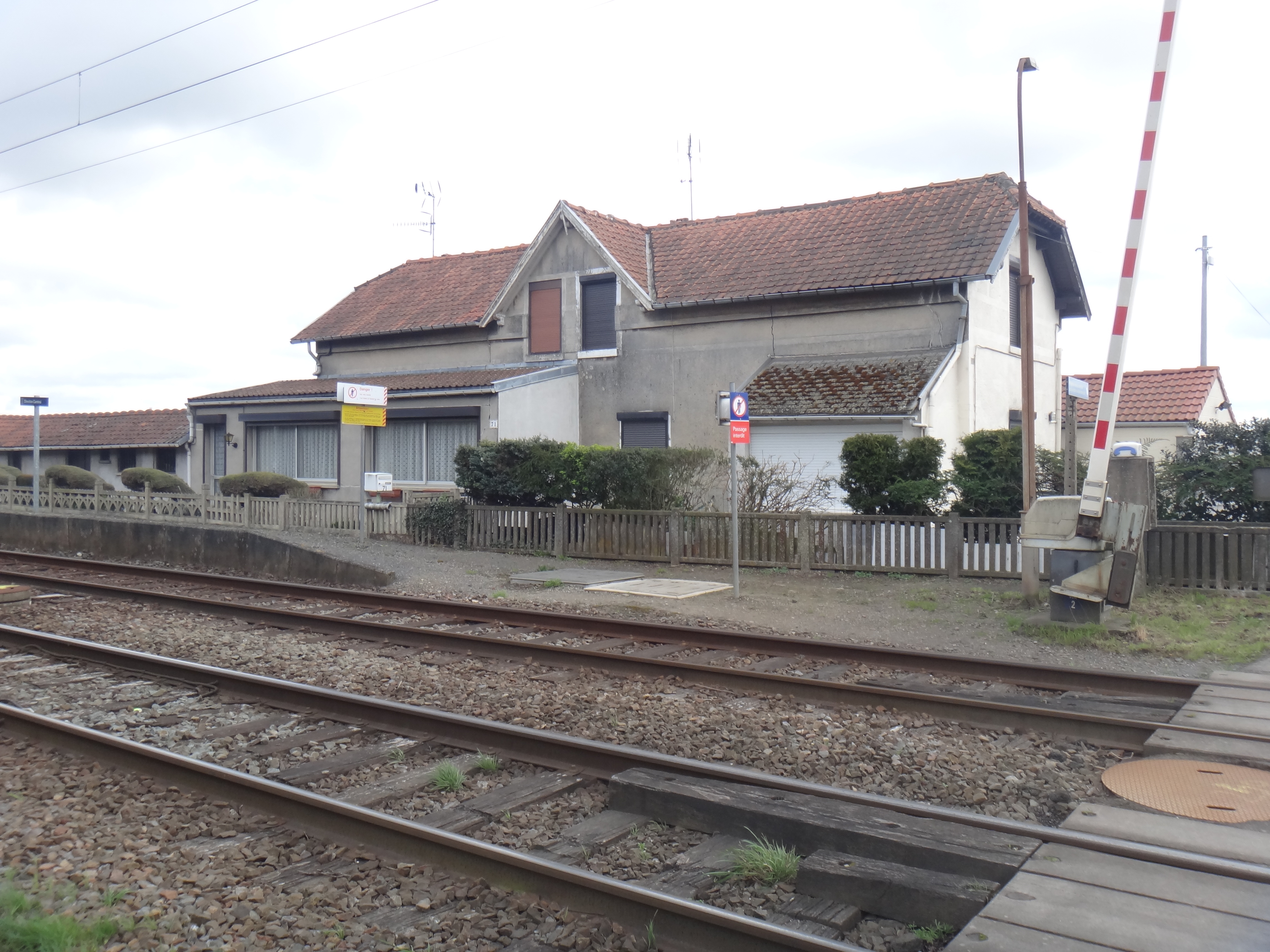 Gare d'Escaudoeuvres, Nord, France, en 2014